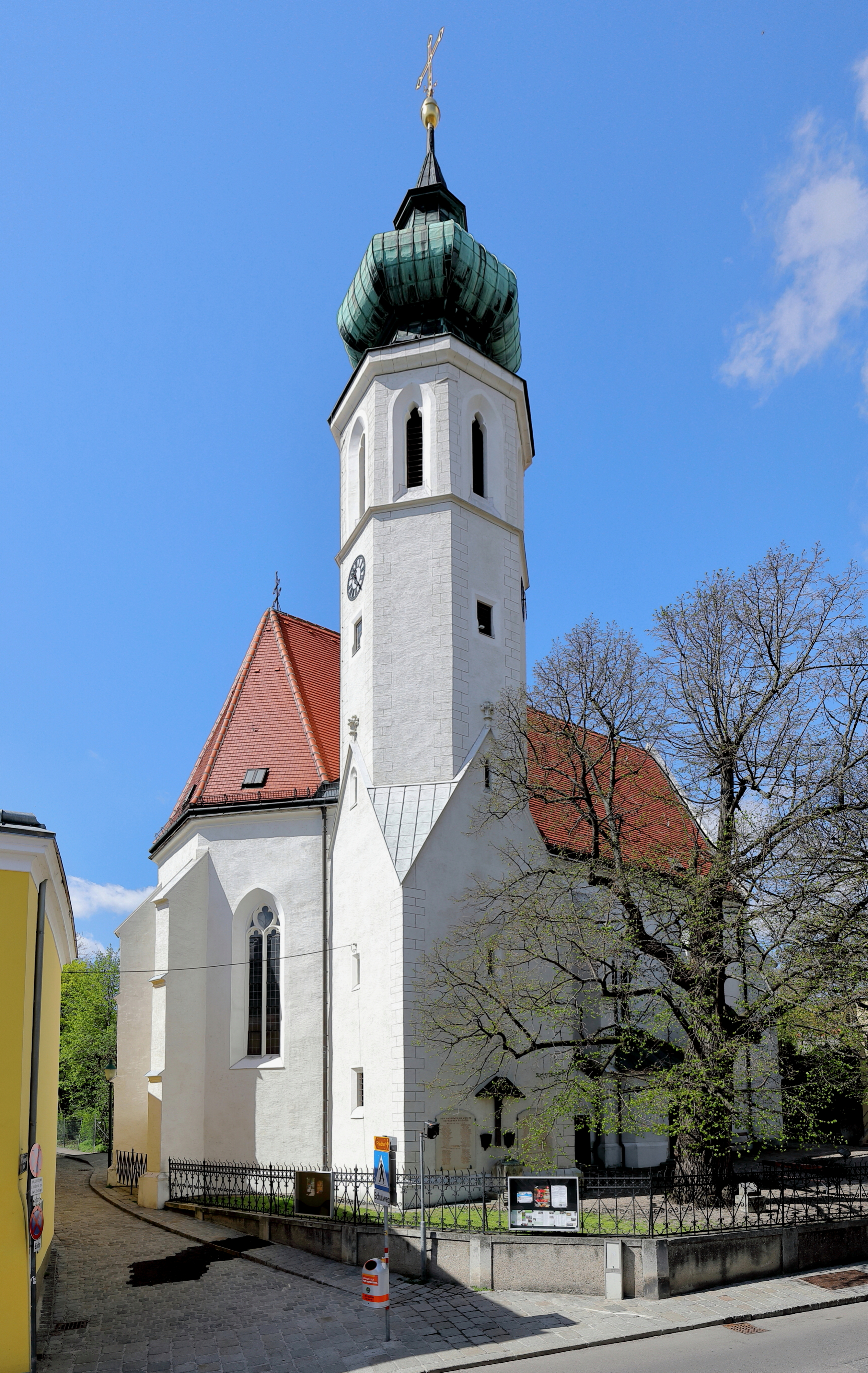 Die röm.-kath. Pfarrkirche Grinzing im 19. Wiener Gemeindebezirk Döbling.